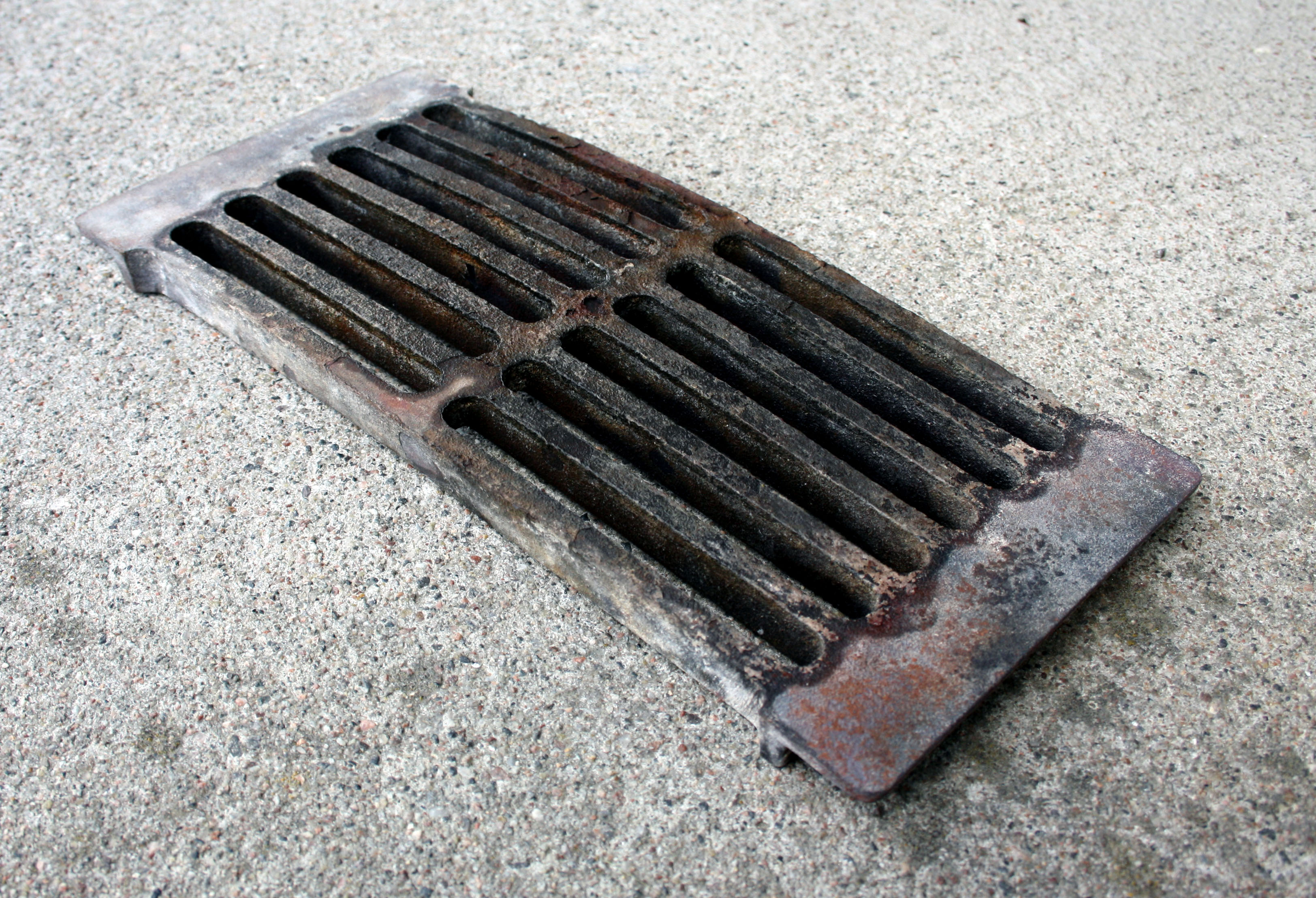 Kiukaan arina